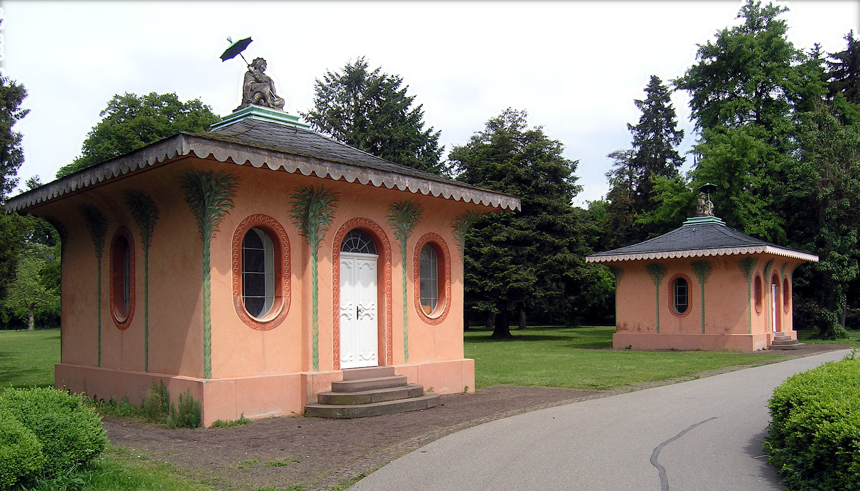 Chinesische Teehäuschen beim Fasanenschlößchen in Karlsruhe